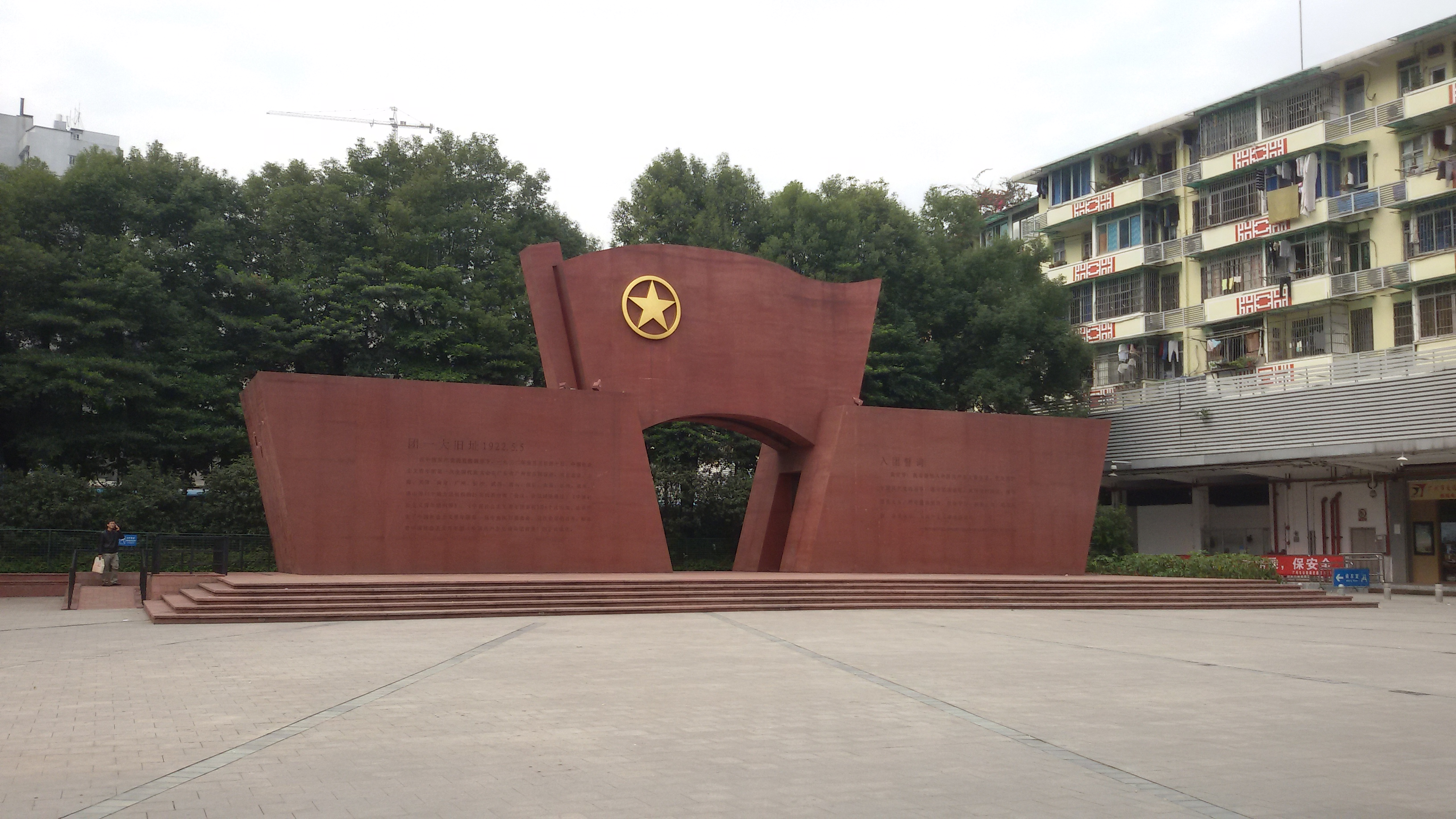 粵語: 團一大紀念廣場